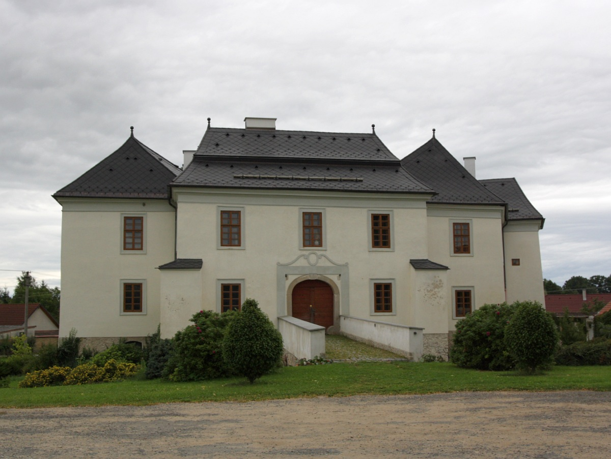 Pluhův Žďár: zámek